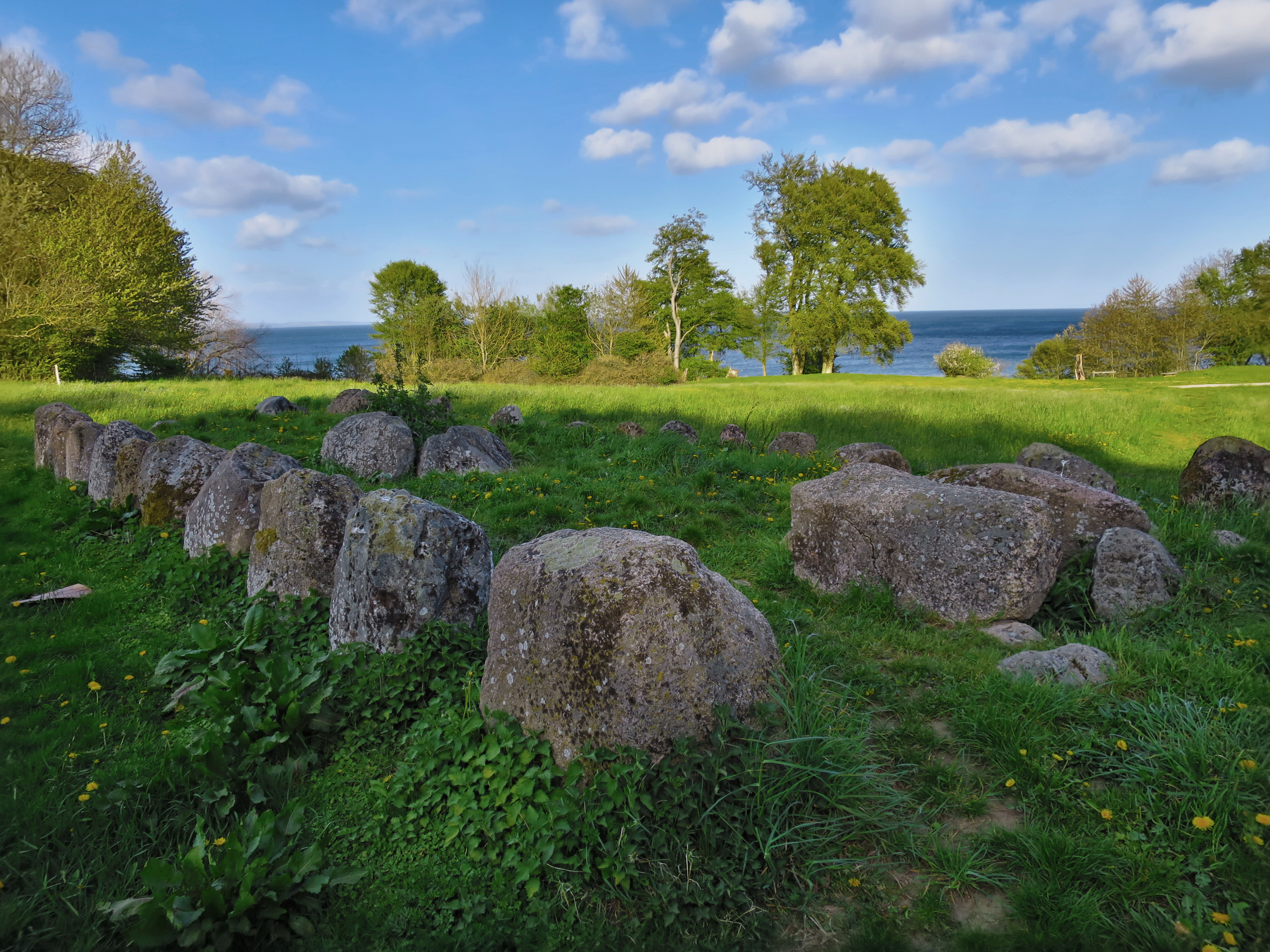 Langdysse på Strandmarken, Moesgård. Fra bondestenalderen. Lå oprindeligt på Stigsnæs på Sjælland.